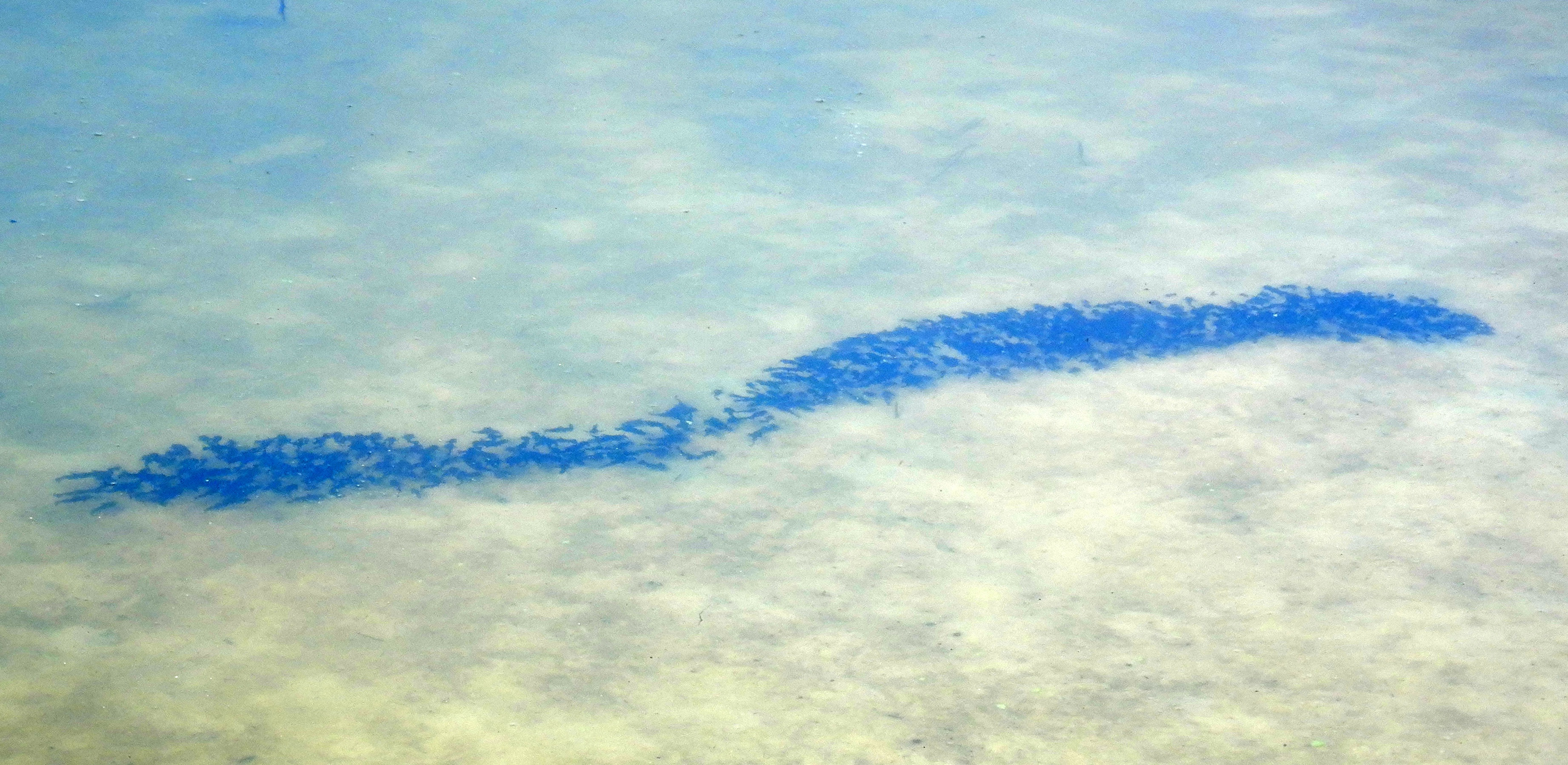 Banc d’alevins groupés (comportement naturel) du poisson chat nord américain Ameiurus melas introduit en Europe et en plein expansion depuis la fin du XXème siècle au moins. Cette photo a été prise à partir de la berge en France dans le Lac artificiel et aménagé pour le tourisme, dit Lac de Clarens (À Casteljaloux), alimenté par la rivière Baraton au sud et doté d’un trop plein qui se jette dans la rivière l’Avance.